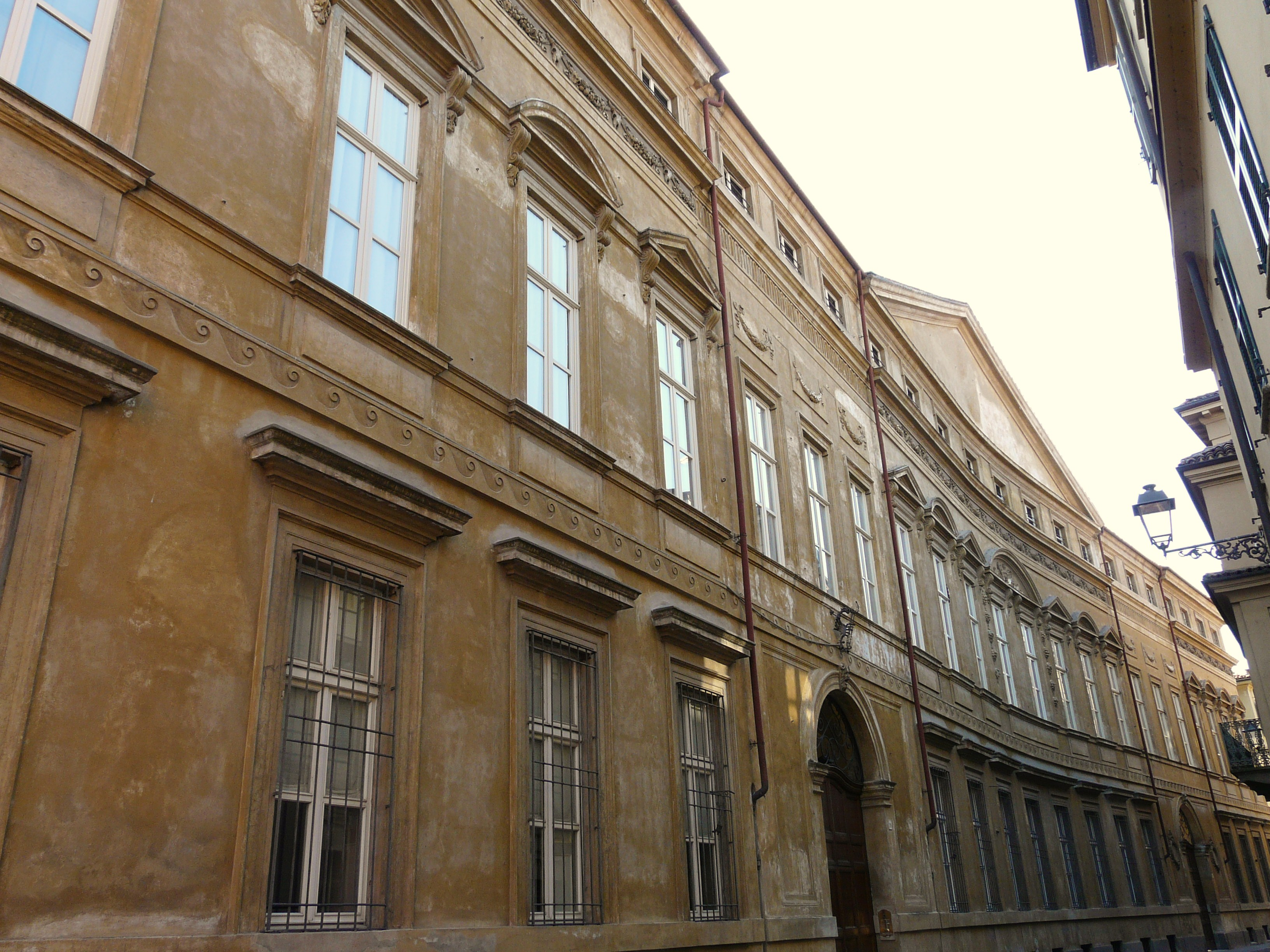 Palazzo in via Mameli presso il palazzo Magnacavalli, Casale Monferrato, Piemonte, Italia